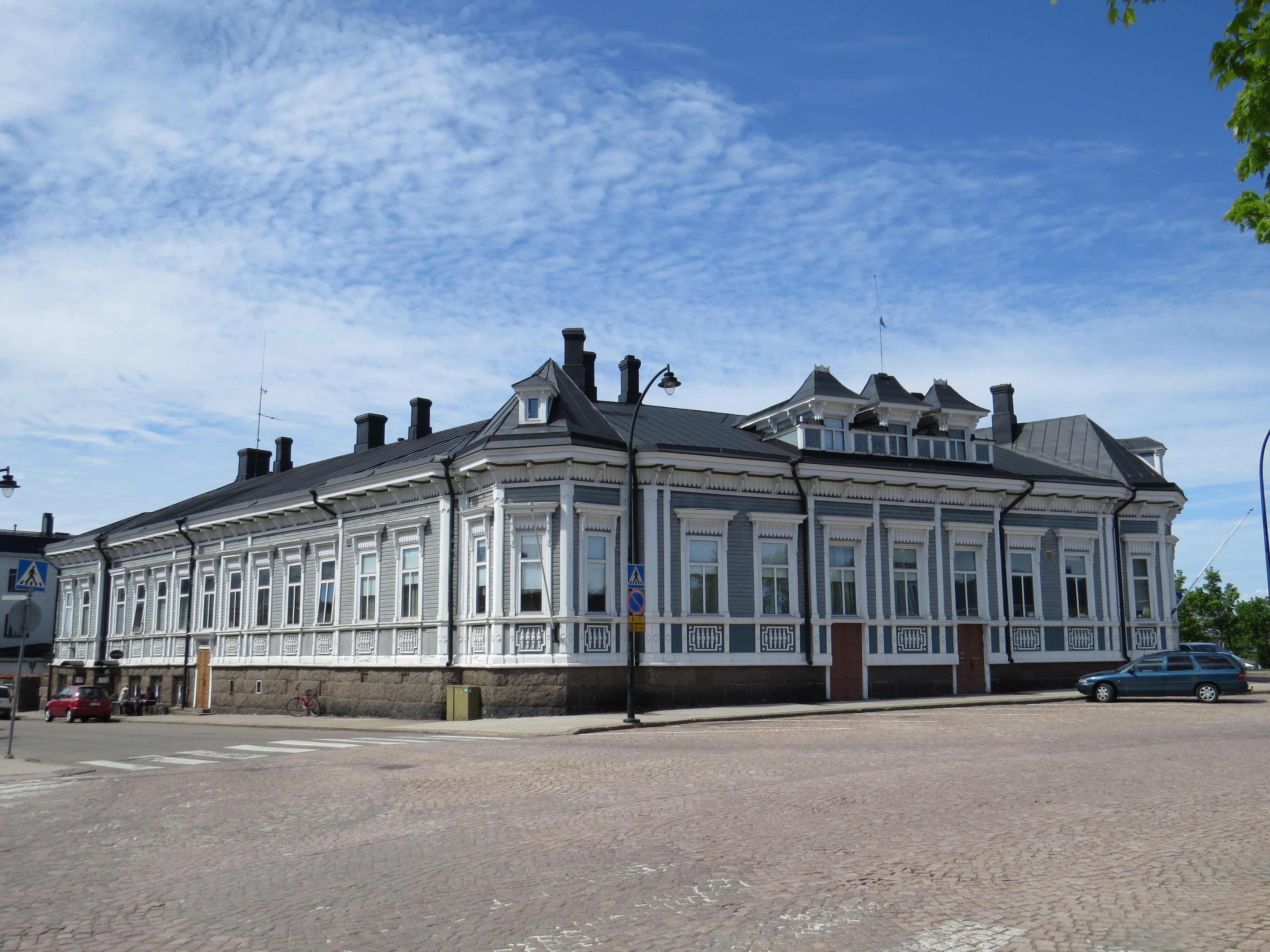 Waldemar Aspelinin suunnittelema Tanelinkulma Haminassa, tunnettu alun perin Aladinin talona.